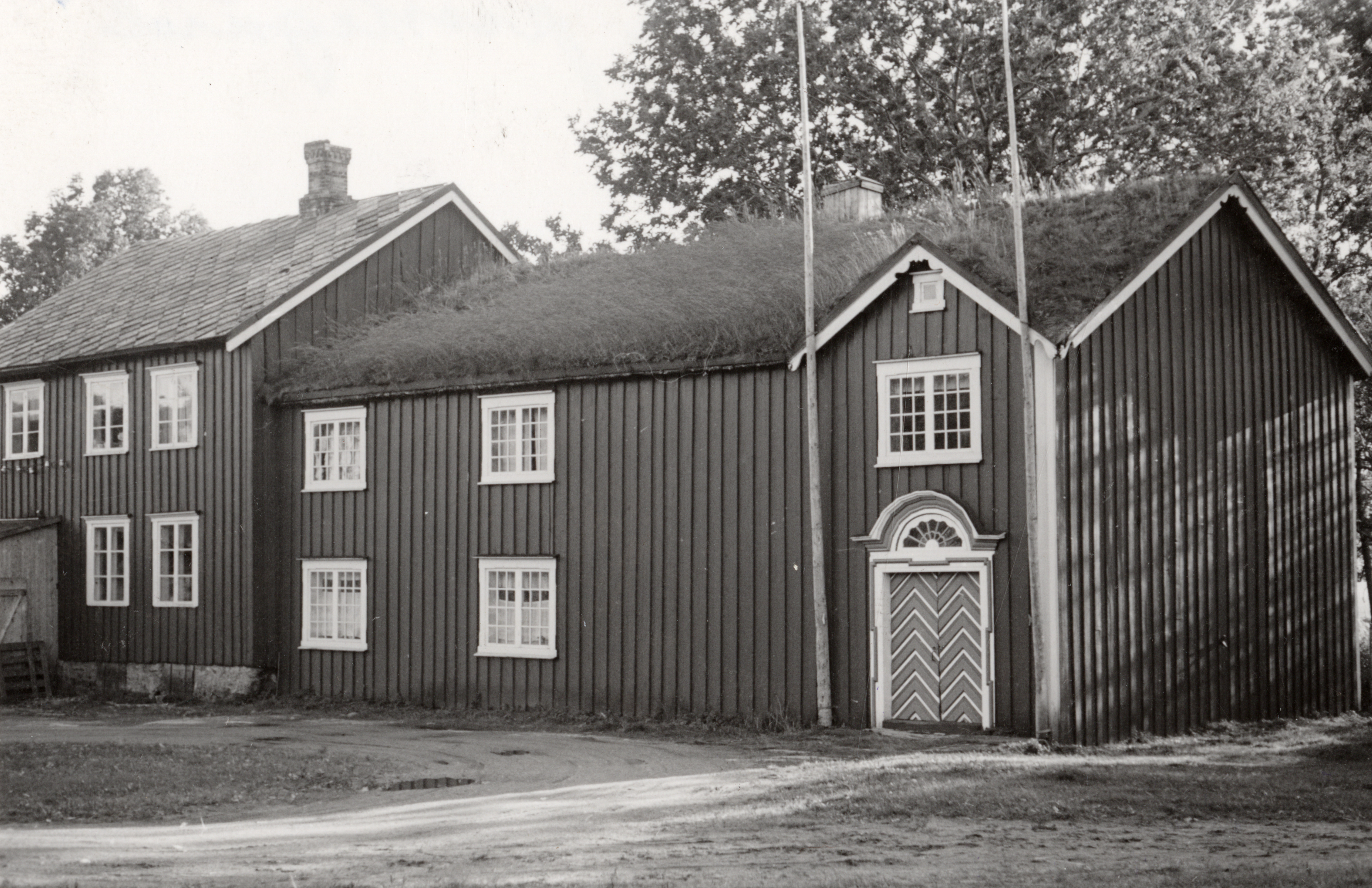 Alstahaug gamle prestegård, Nordland